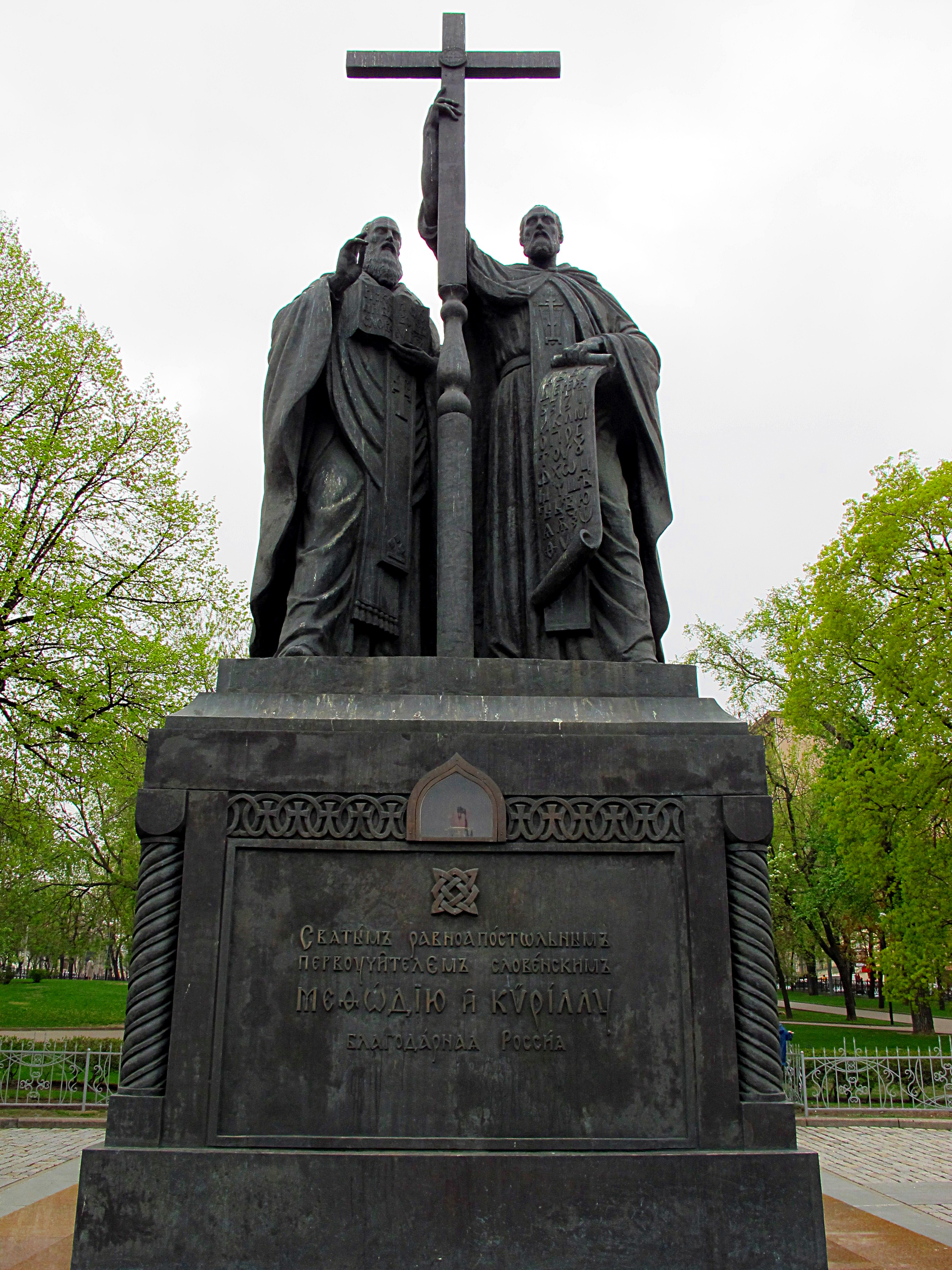 Памятник святым равноапостольным братьям Мефодию и Кириллу в Москве на Славянской площади (крупный план)